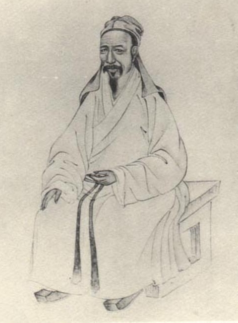 清代学者。Li Gong